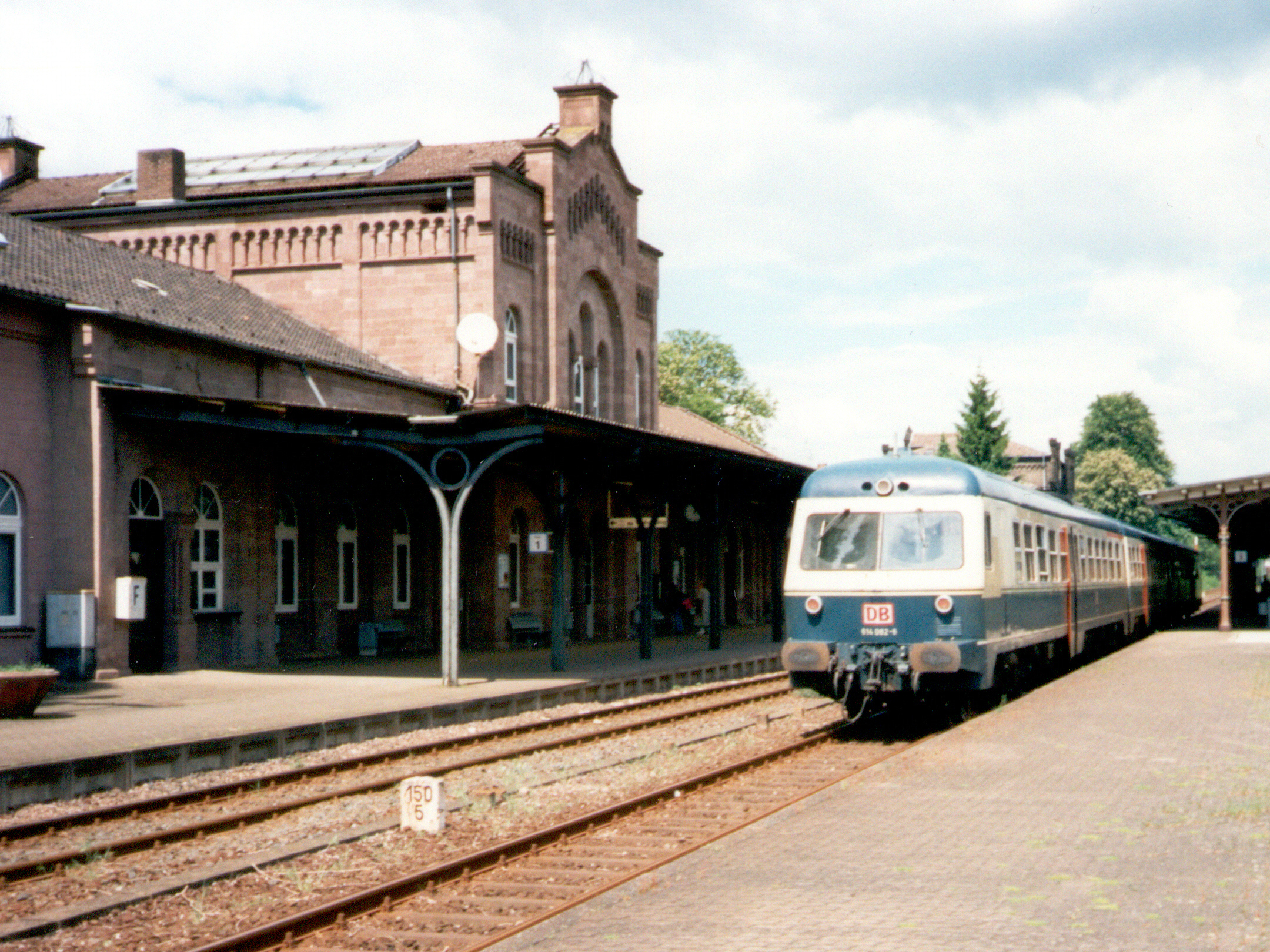 Eine 614-Einheit bestehend aus 614 081, 914 042, 614 082 hält am 24.05.1997 auf dem Weg von Bielefeld nach Braunschweig in Holzminden.